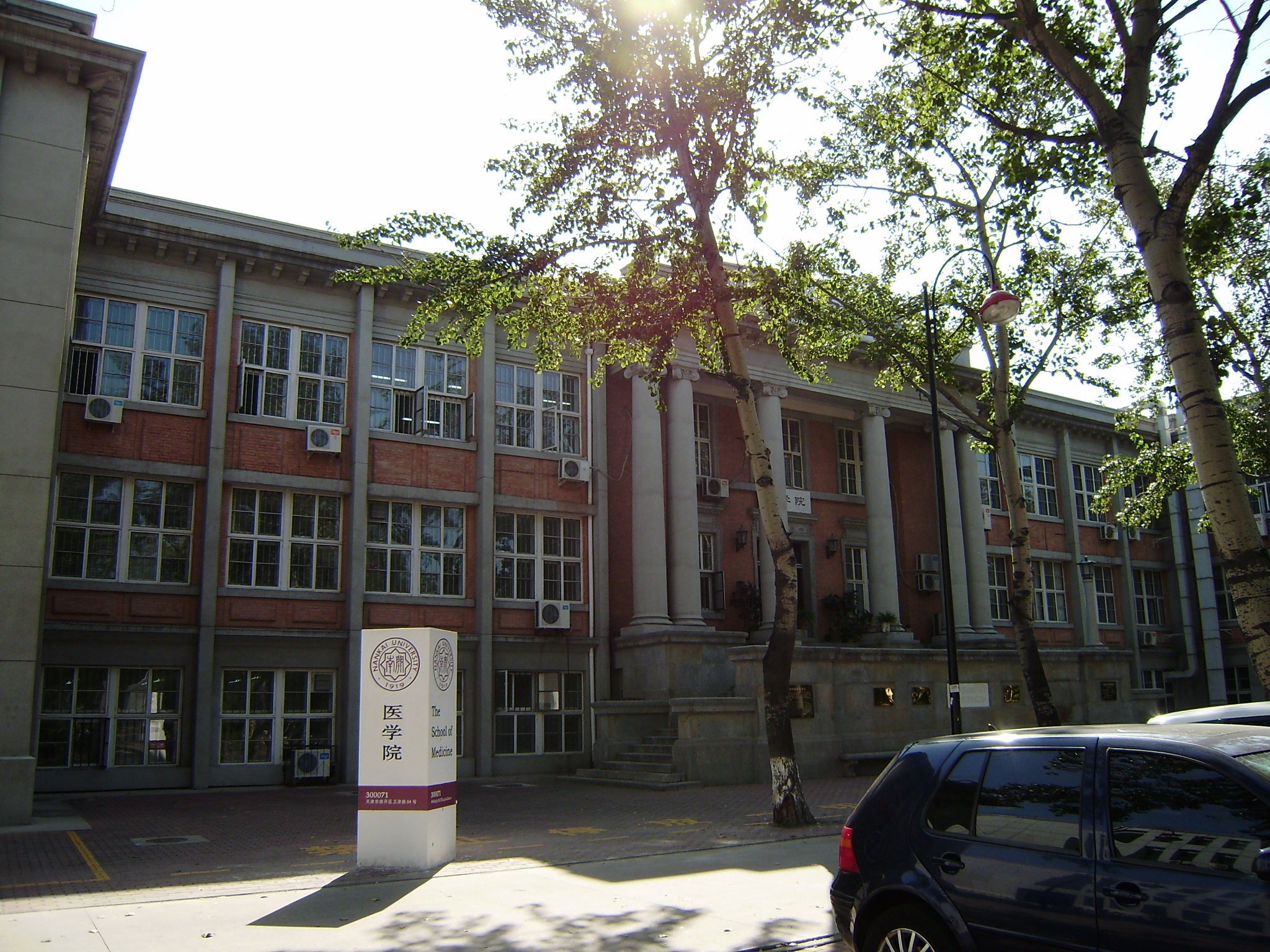 洛克菲勒财团民国期间在天津兴建